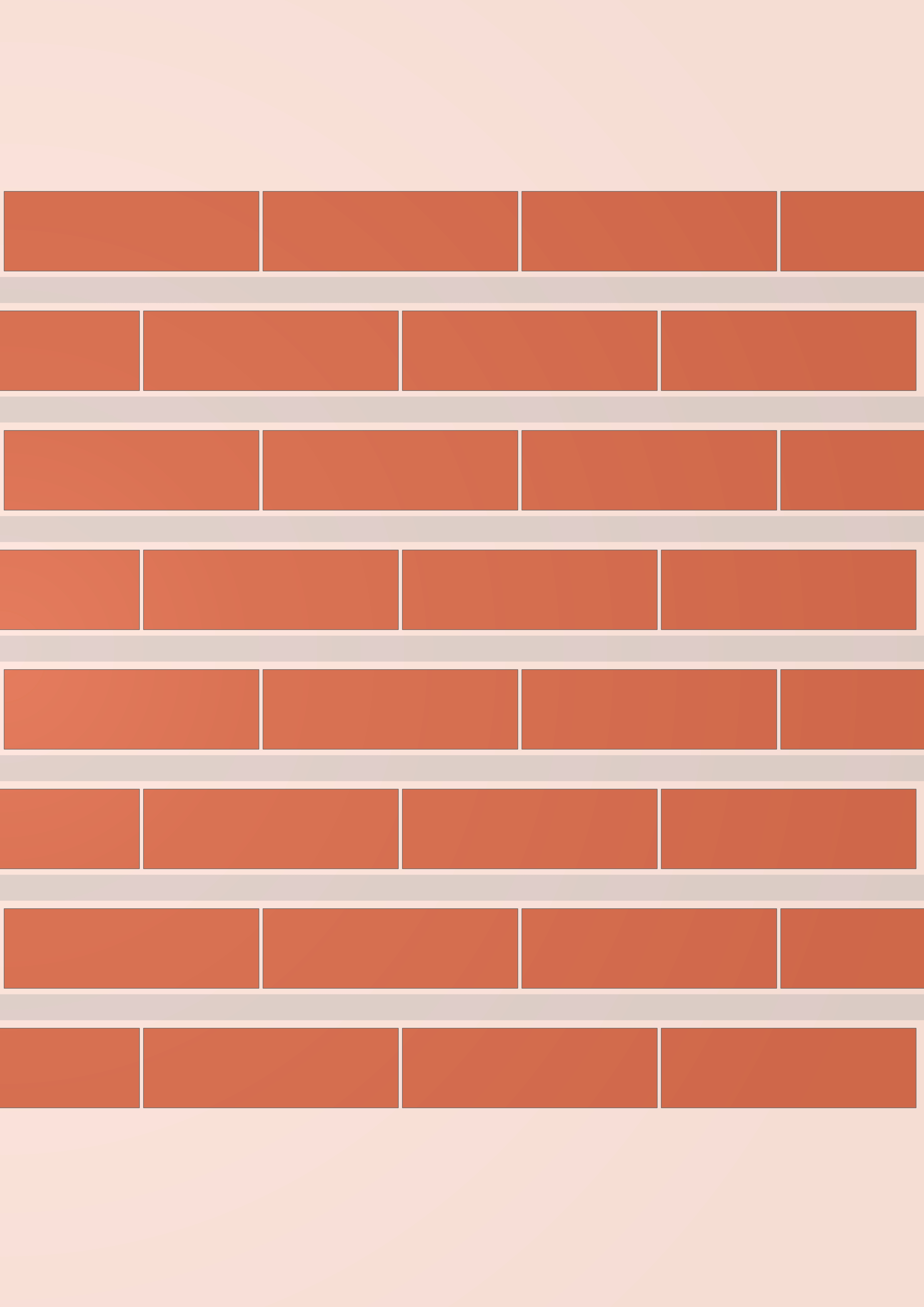 Imagen en la que se aprecia hiladas de ladrillos colocados según la técnica del avitolado.